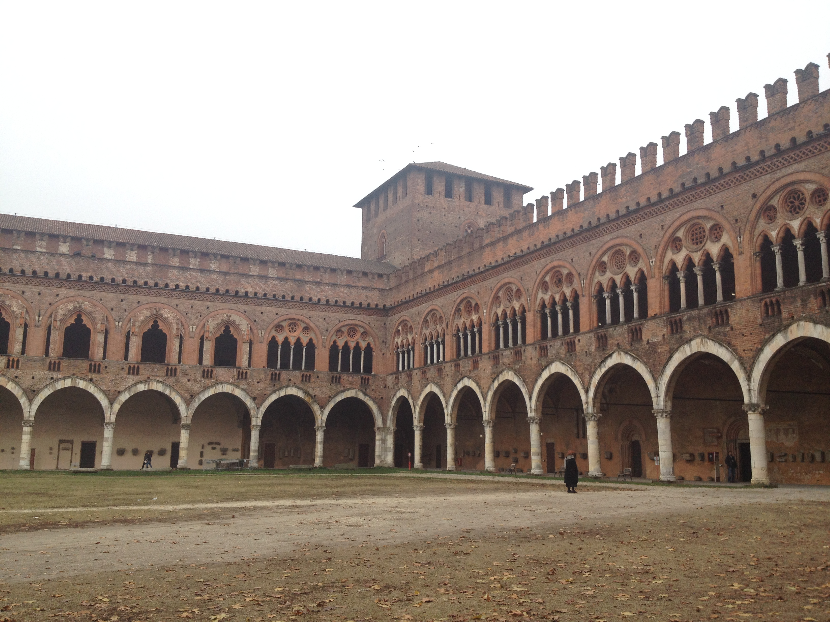 Castello Visconteo (Pavia) - angolo sud-est del cortile interno This is a photo of a monument which is part of cultural heritage of Italy.